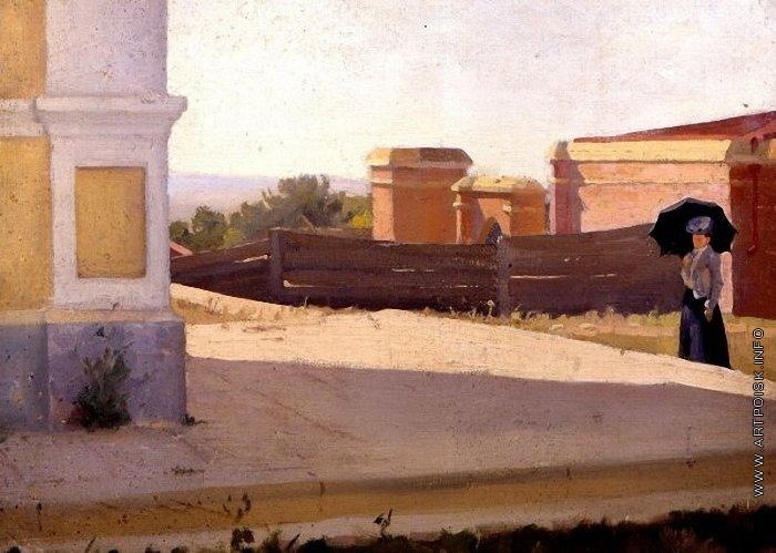 картины Попова Лукиана Васильевича [1873—1914]